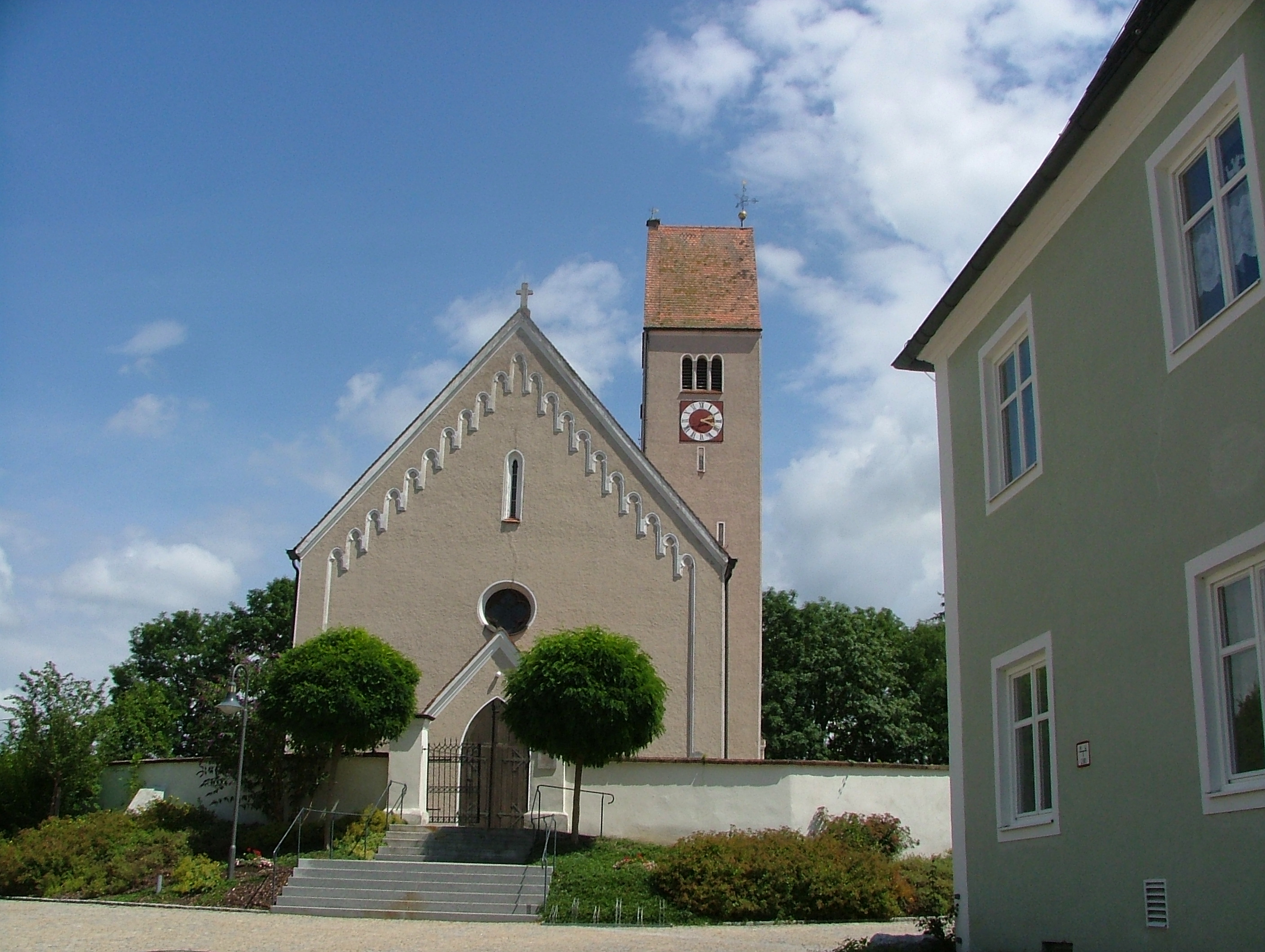 Egg an der Günz